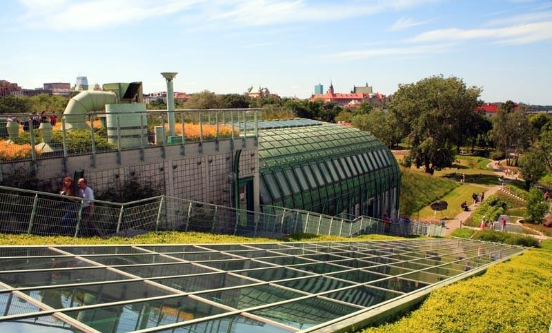 Warszawa (Polska)